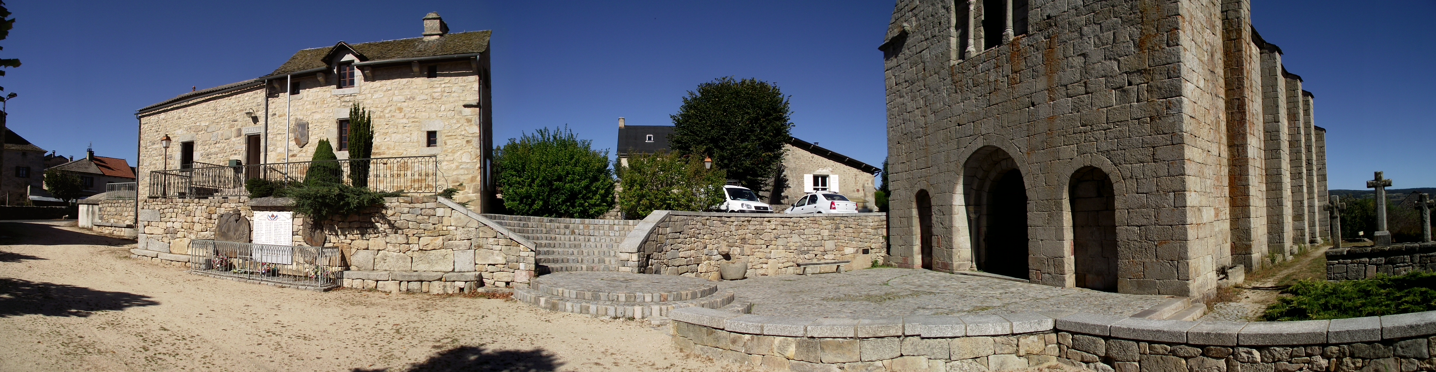 Panoramique de la mairie de Prunières sur la gauche et une partie de la façade de l'église sur la droite